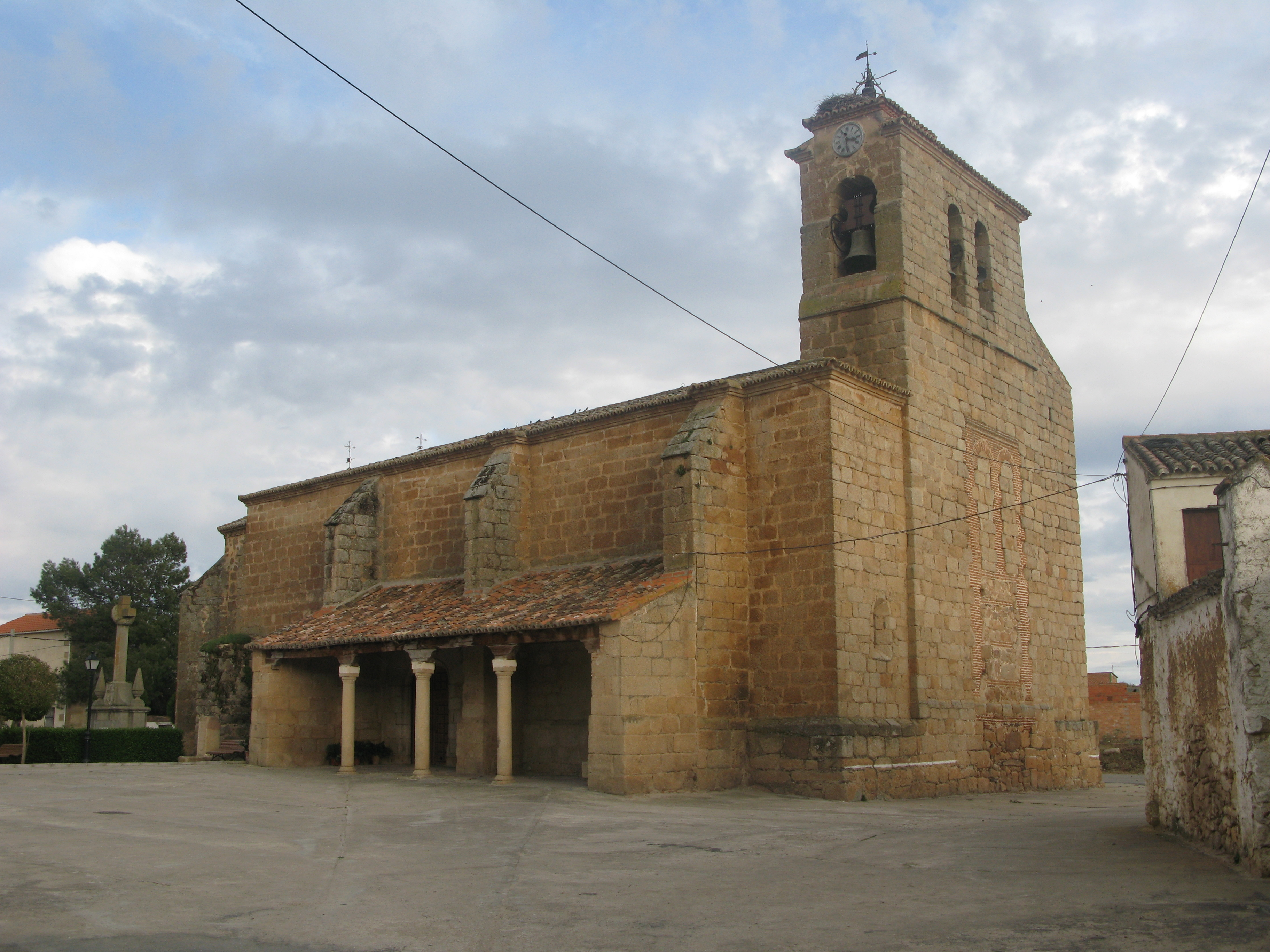 Iglesia del municipio de Villar del Pedroso